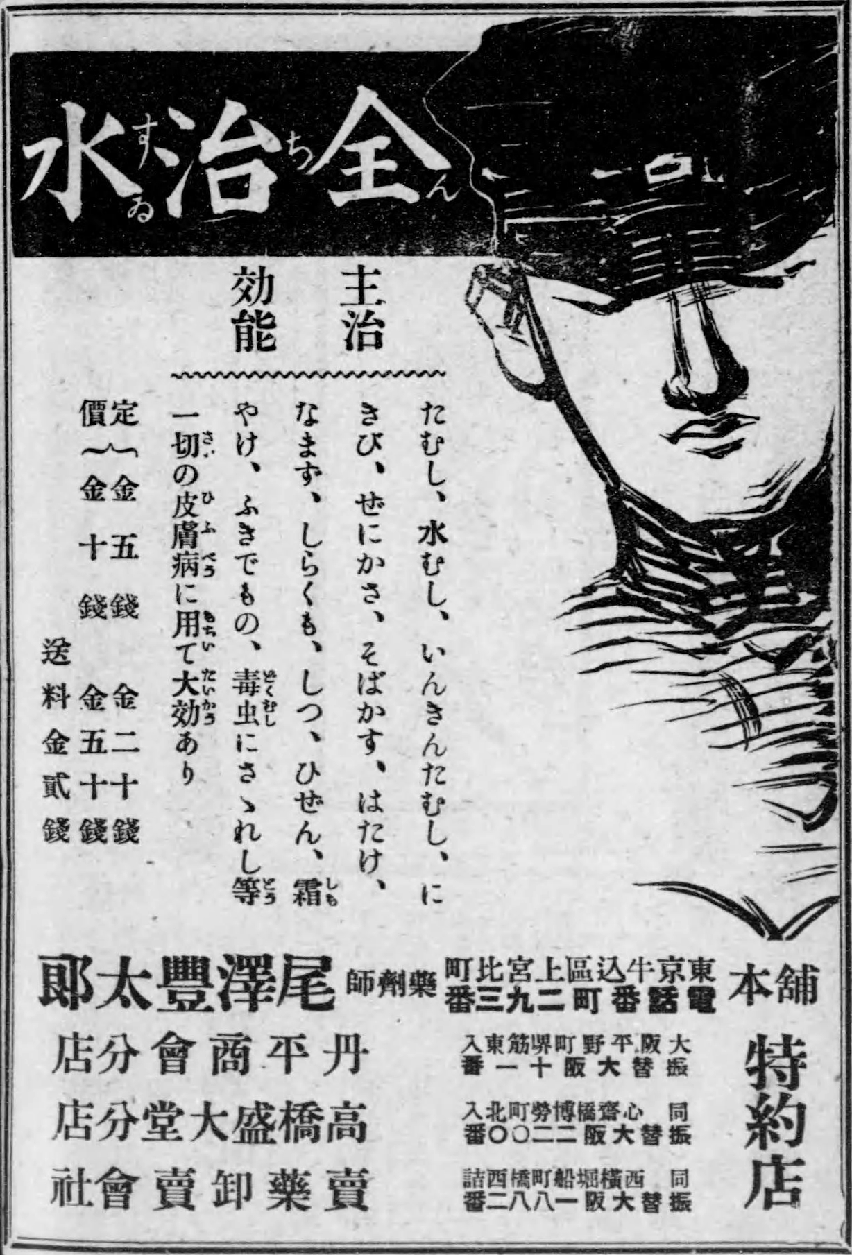 塩見伊八郞編纂『賣藥製法全書』艸樂新聞社、1917年。